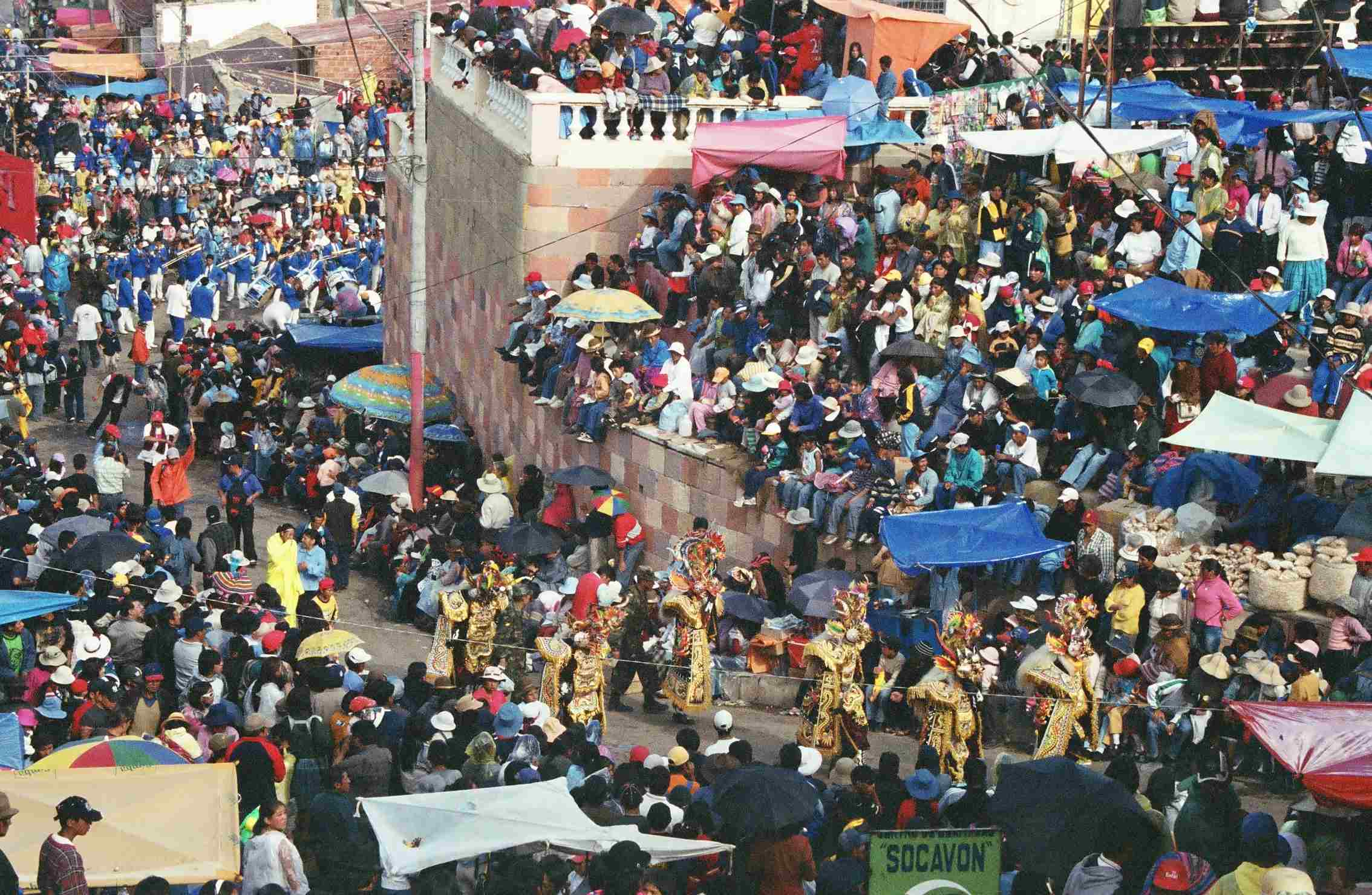 Imagen del Carnaval de Oruro, obtenida durante las celebraciones en el verano del año 2005.